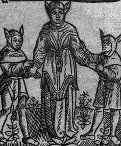 Pierre Gringore (né en 1475 à Thury-Harcourt et mort en 1539 en Lorraine, poète et dramaturge français), travesti en Mère Sotte.